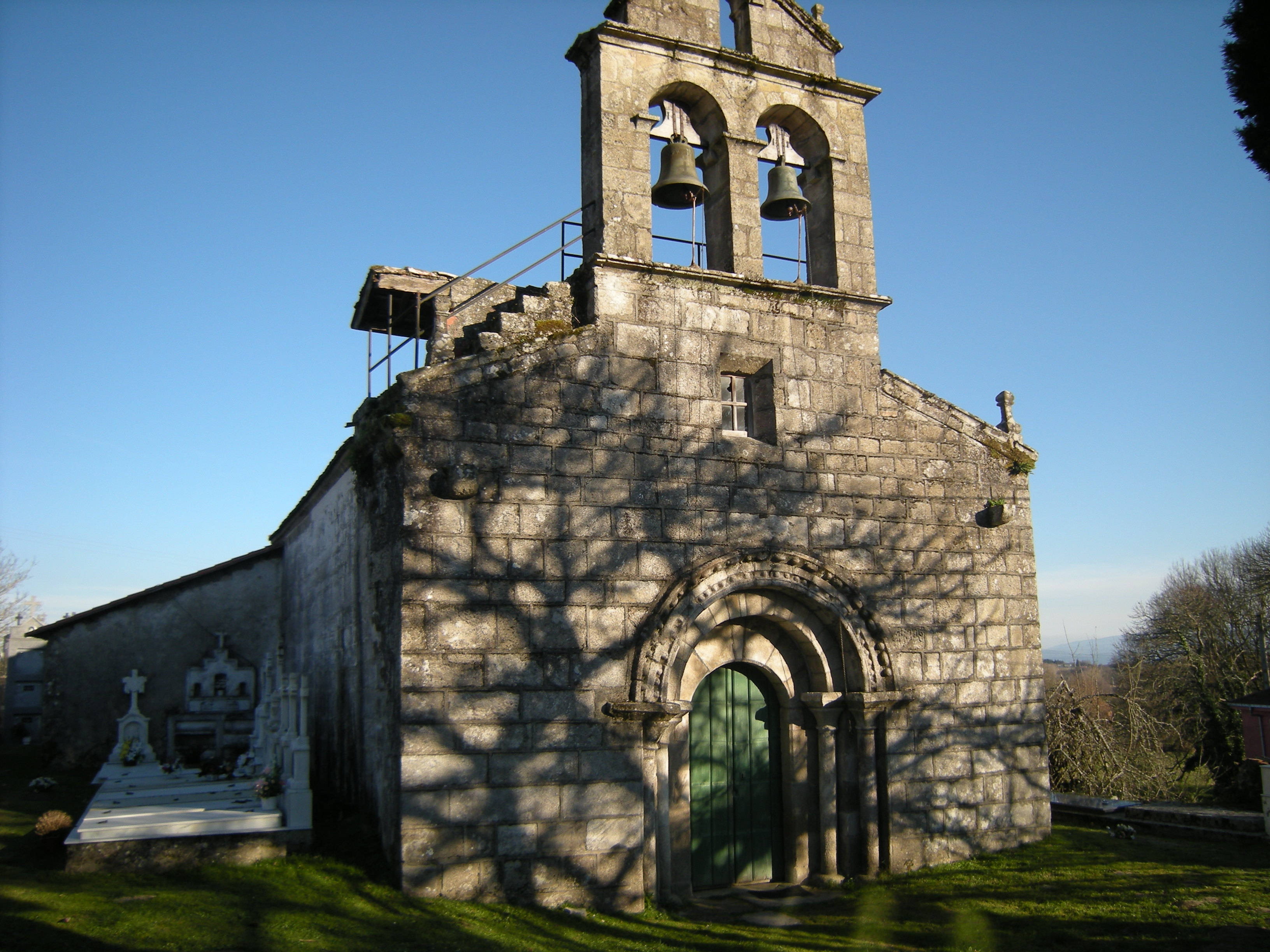 Iglesia de Santa María de Marrube